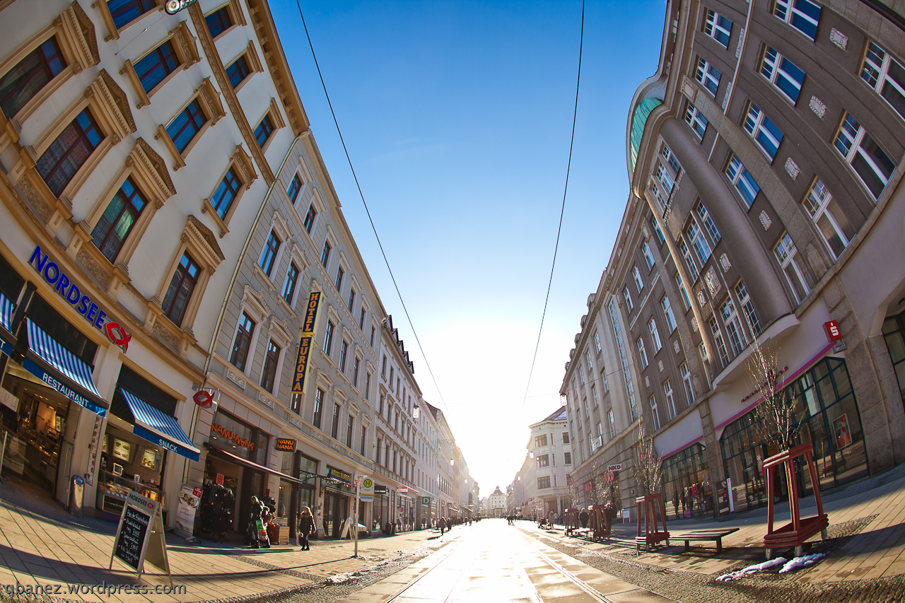 Gorlitz ul. Berlińska